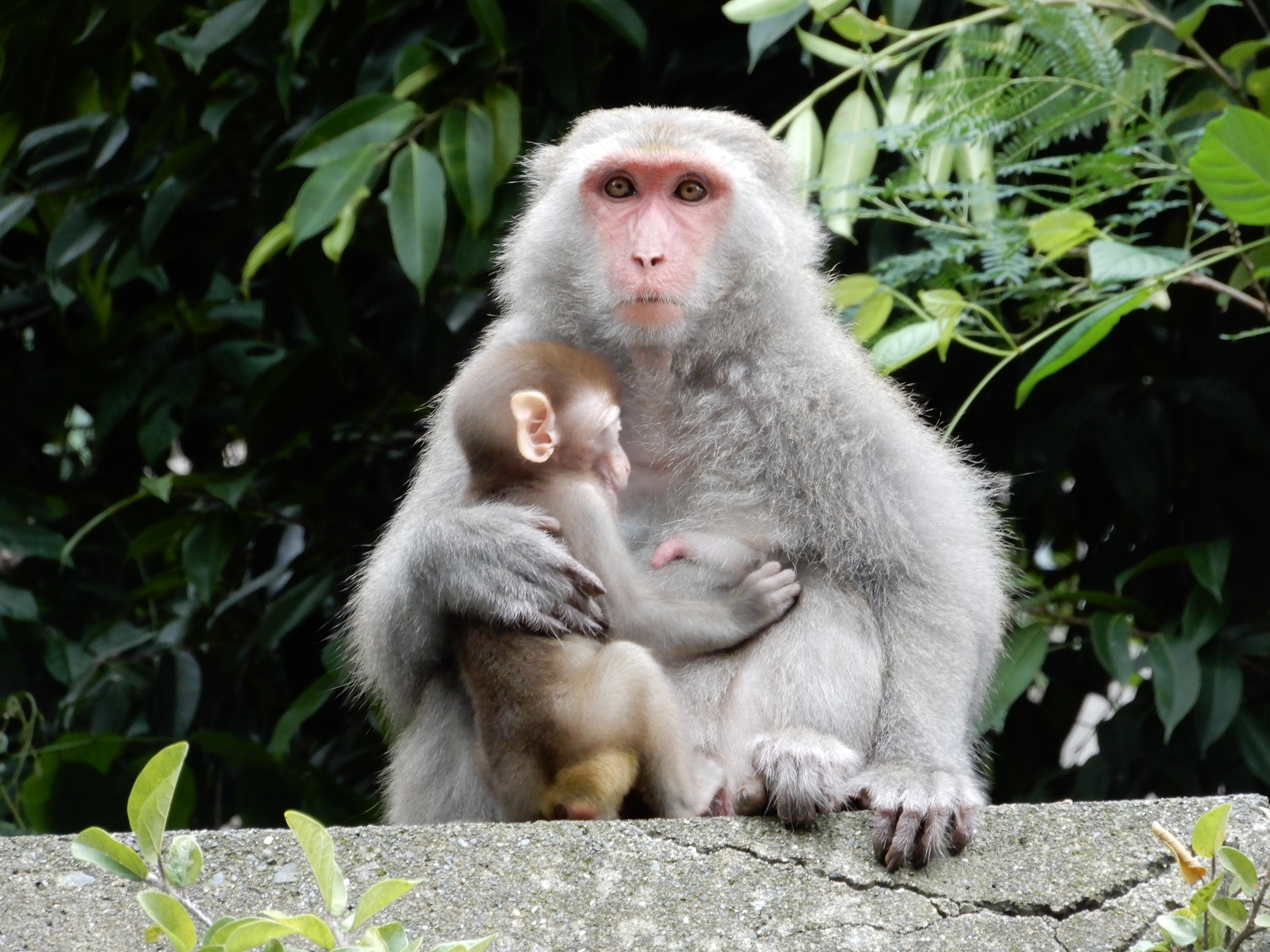 這是在壽山國家自然公園裡捕捉到的影像，一隻台灣獼猴寶寶正安穩地在獼猴媽媽懷裡吸允母奶，而獼猴媽媽在看著那些人來人往的人潮，似乎很熟悉這樣的情景...... 到底是台灣獼猴在壽山氾濫，還是人類進入了他們的地盤，才會造成所謂的衝突，這本來不會是個問題，但直到人類越來越開發牠們的棲息地，正也意味著台灣獼猴進入我們的生活圈，所以開始出現了獼猴搶食物的現象，是誰挑起了爭端? 在這張照片裡，我和獼猴媽媽的距離好近，卻也好遠，甚至覺得和她在不同的世界，熙熙攘攘的人群，她想把獼猴寶寶與紛擾的世界隔離，凝視的眼神，告訴我她只想要好好擁抱獼猴寶寶在懷裡，只需要一些寧靜......